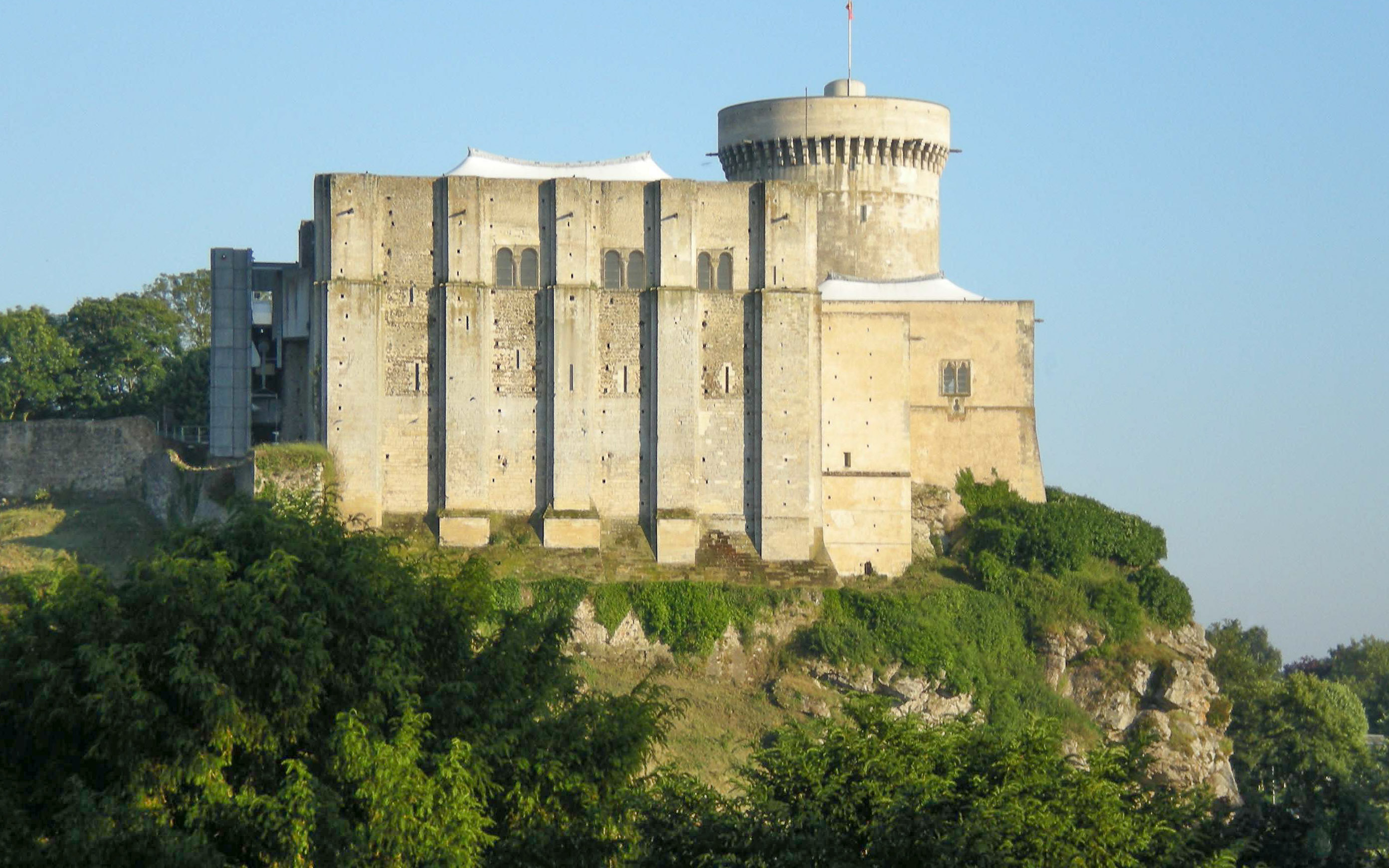 Château médiéval de Falaise (Normandie), lieu de naissance de Guillaume le Conquérant